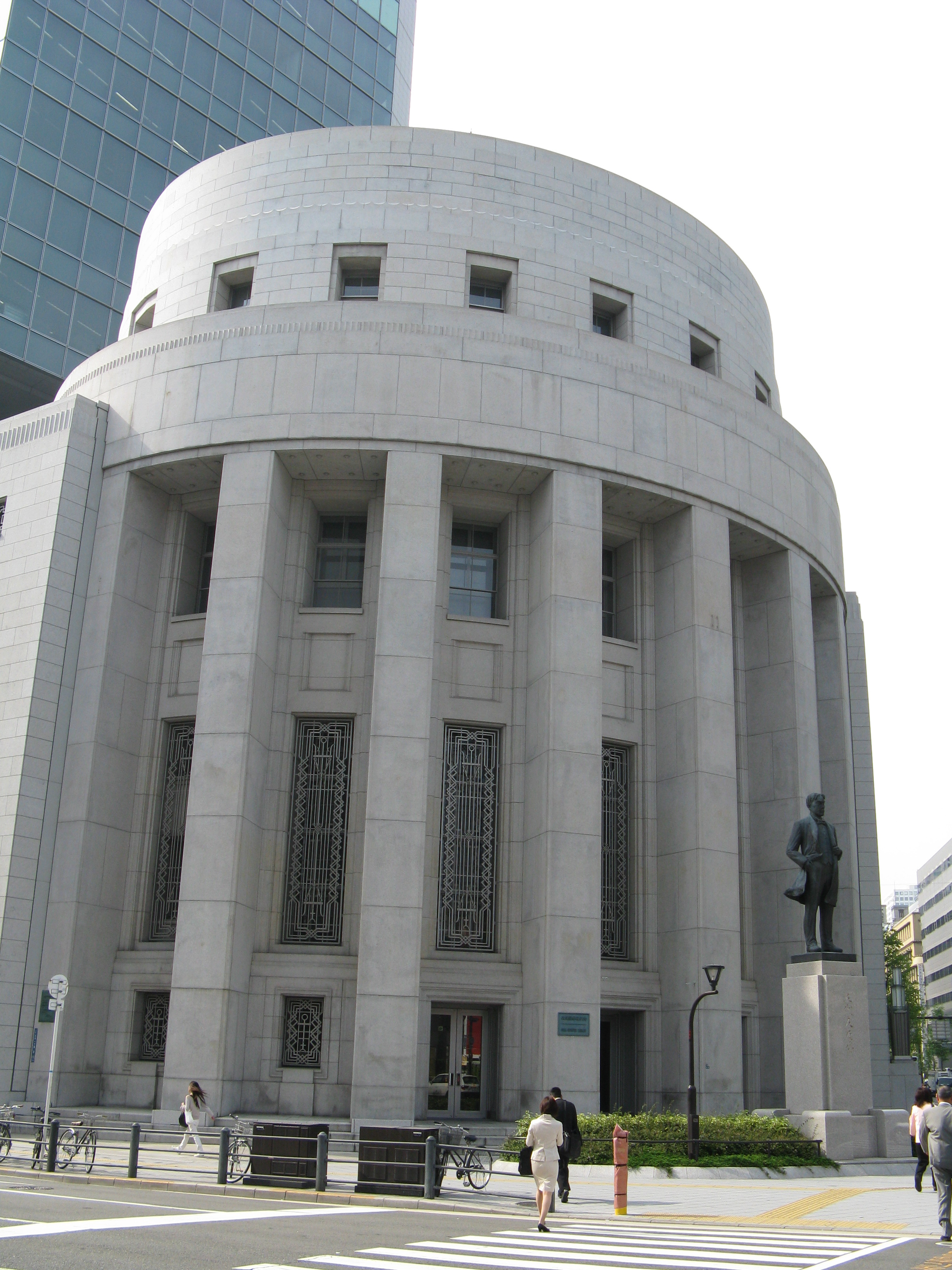 大阪証券取引所ビル